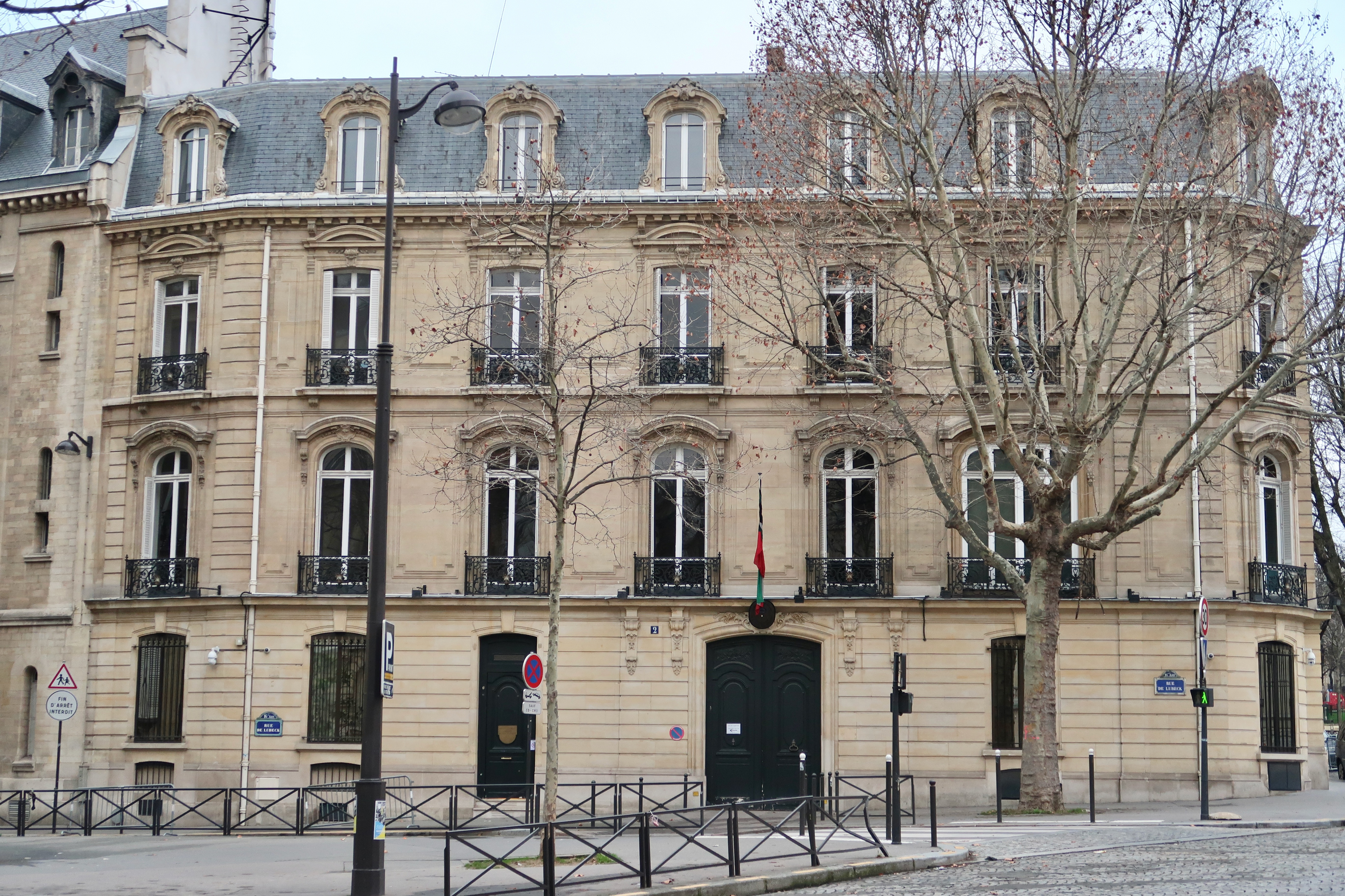 Ambassade du Koweït en France, 2 rue de Lübeck (Paris, 16e).